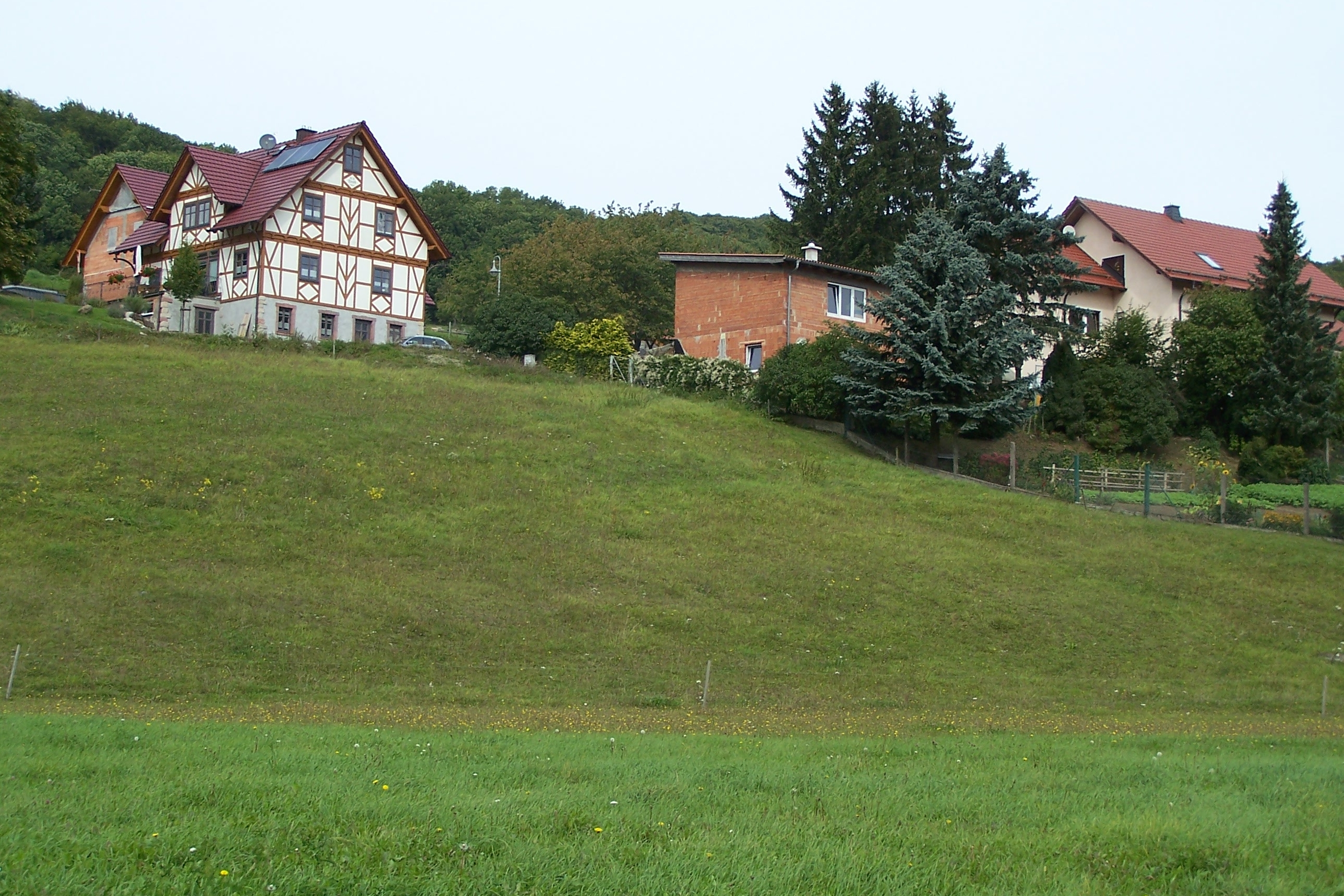 Gerstengrund